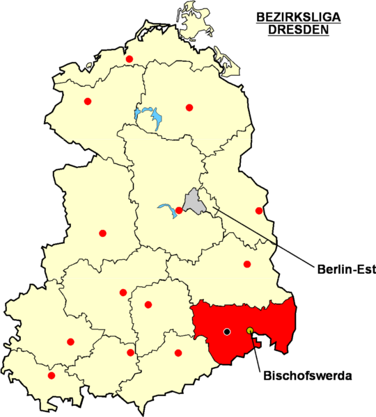 Localisation de Bischofswerda dans la "Bezirksliga Dresden" Catégorie:Logo de clubs de football - Allemagne